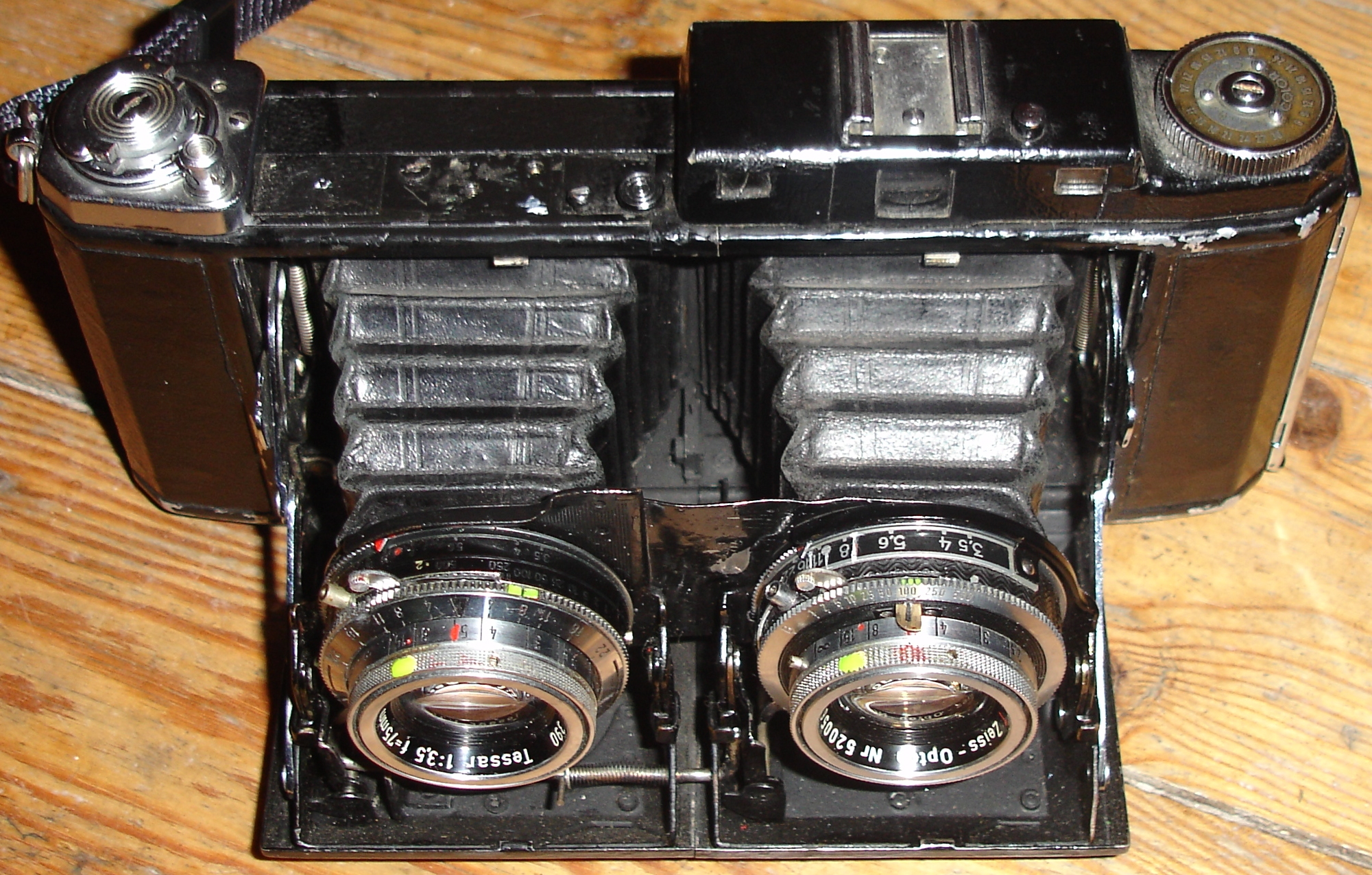 Tot stereocamera samengebouwde klapcamera's